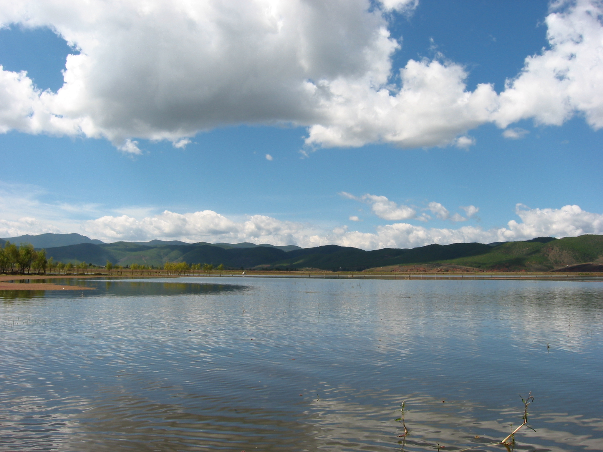 中国云南拉市海湿地